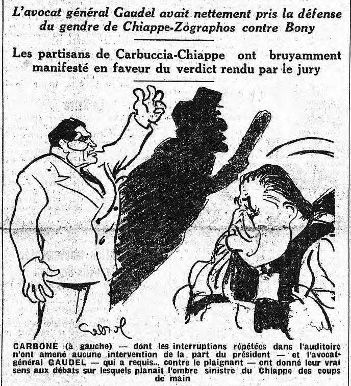 Les interventions de Paul Carbone lors du procès qui oppose Pierre Bonny au journal Gringoire et l'influence de l'ex-préfet Jean Chiappe sur celui-ci, caricaturé dans L'Humanité du 1er décembre 1934.